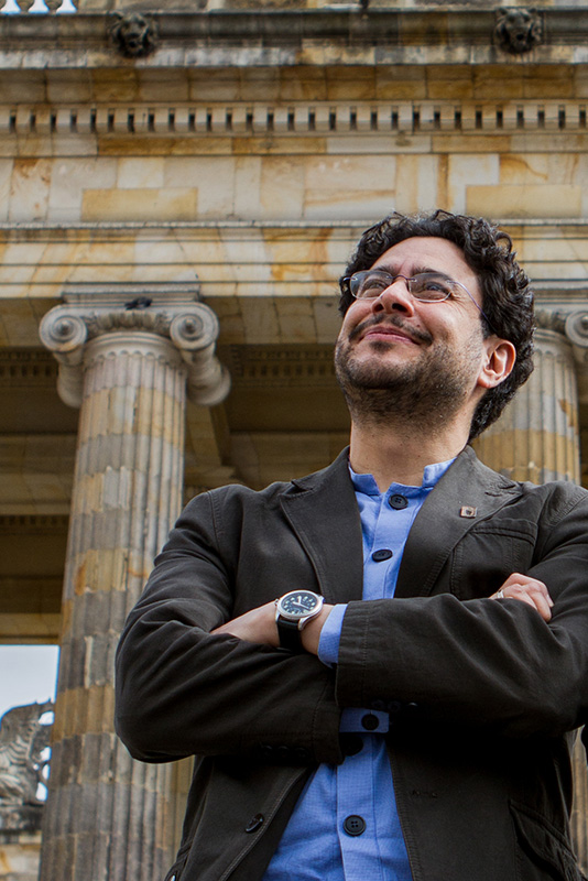 Foto en la plaza de Bolívar